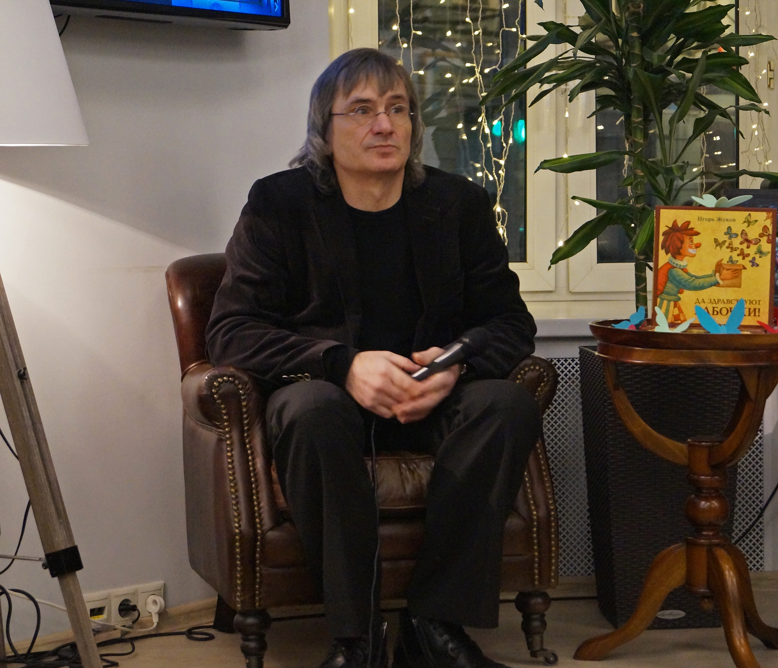 Поэт и сказочник Игорь Жуков на презентации своей книги "Да здравствуют бабочки!"